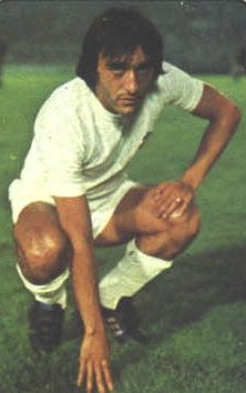 Foto de "Darío Felman" con la camiseta del Valencia C.F.